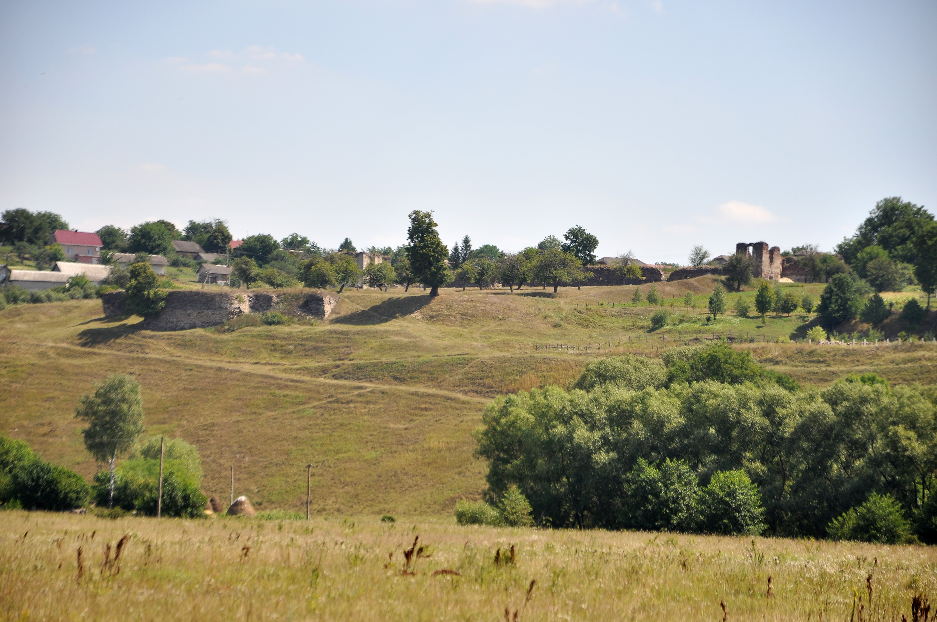 Вигляд на руїни замку в селі Підзамочок Бучацького району Тернопільської області України з Нагірянського пагорба.